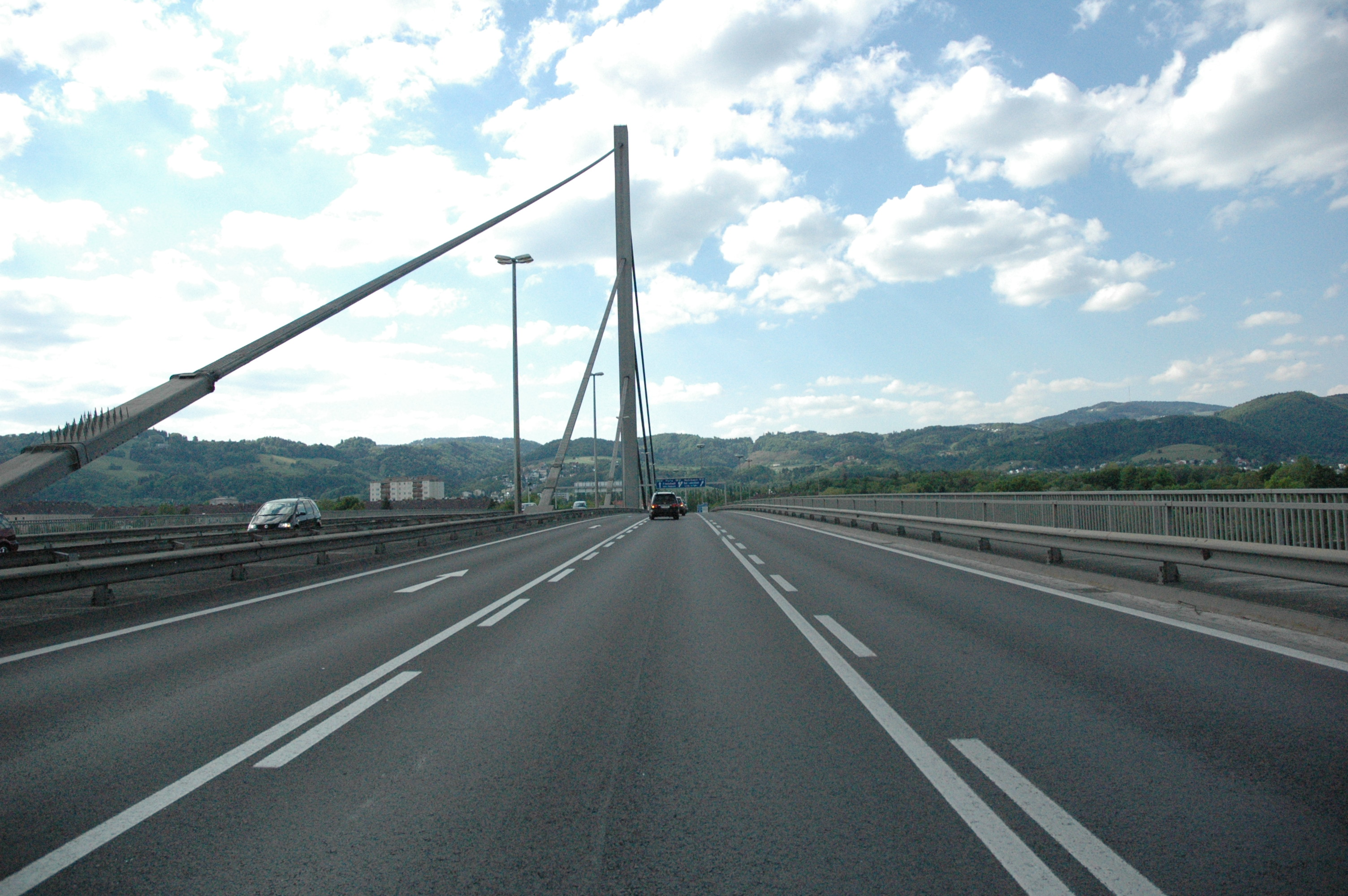 Die Autobahnbrücke der A7 Mühlkreisautobahn in Linz